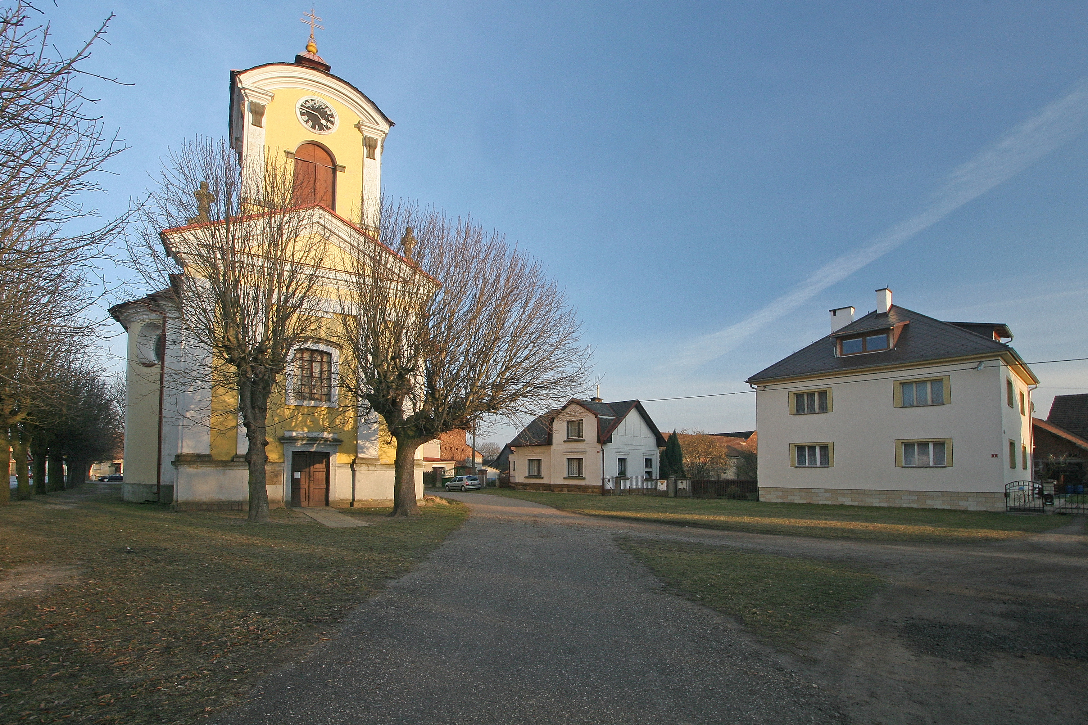 Kostel svatého Dionýsia, náves, Chomutice